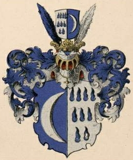 Stryki suguvõsa aadlivapp